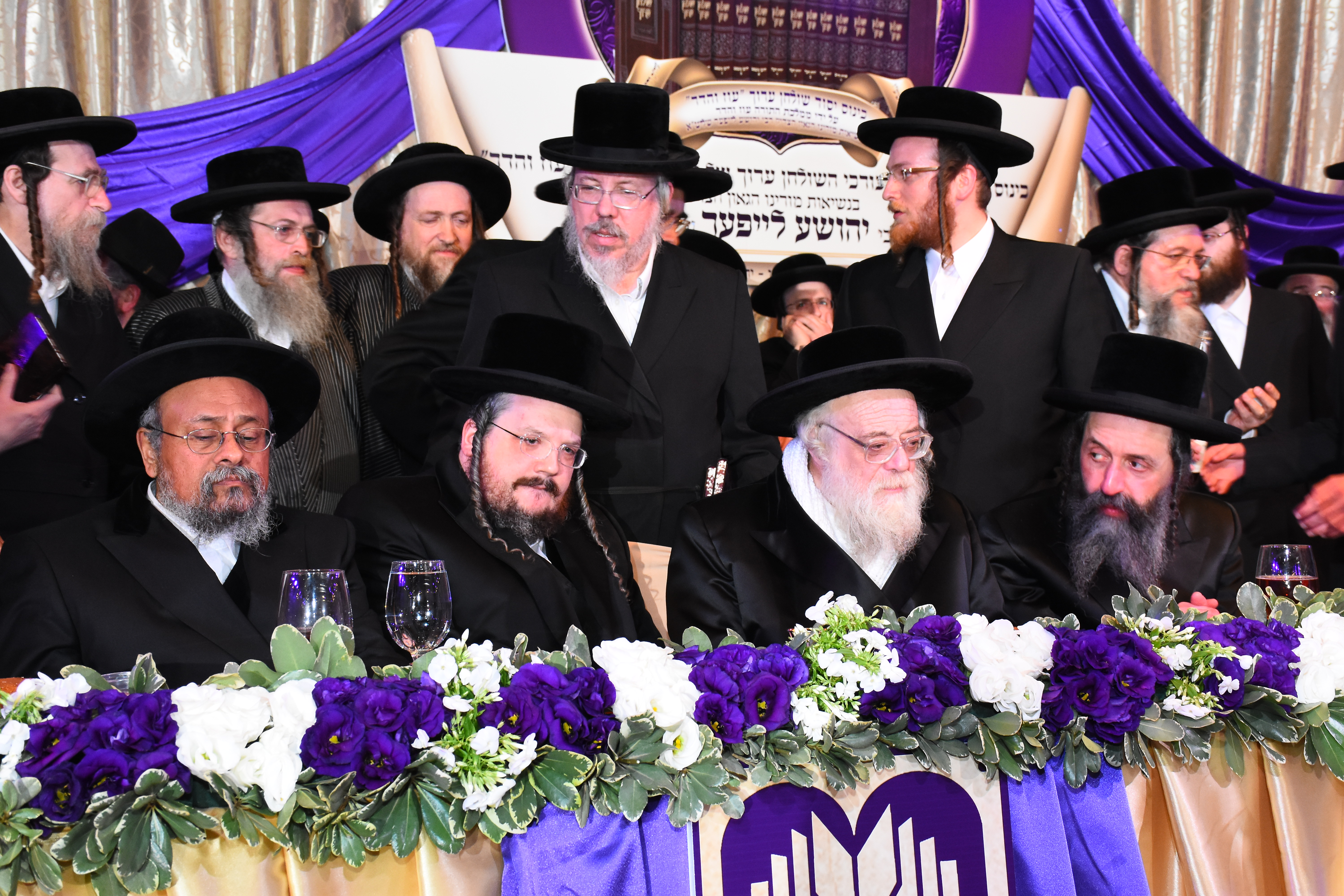 האדמו"ר מתולדות אהרן - הרב אבנר עפגין - הרב אהרן מרדכי רוקח